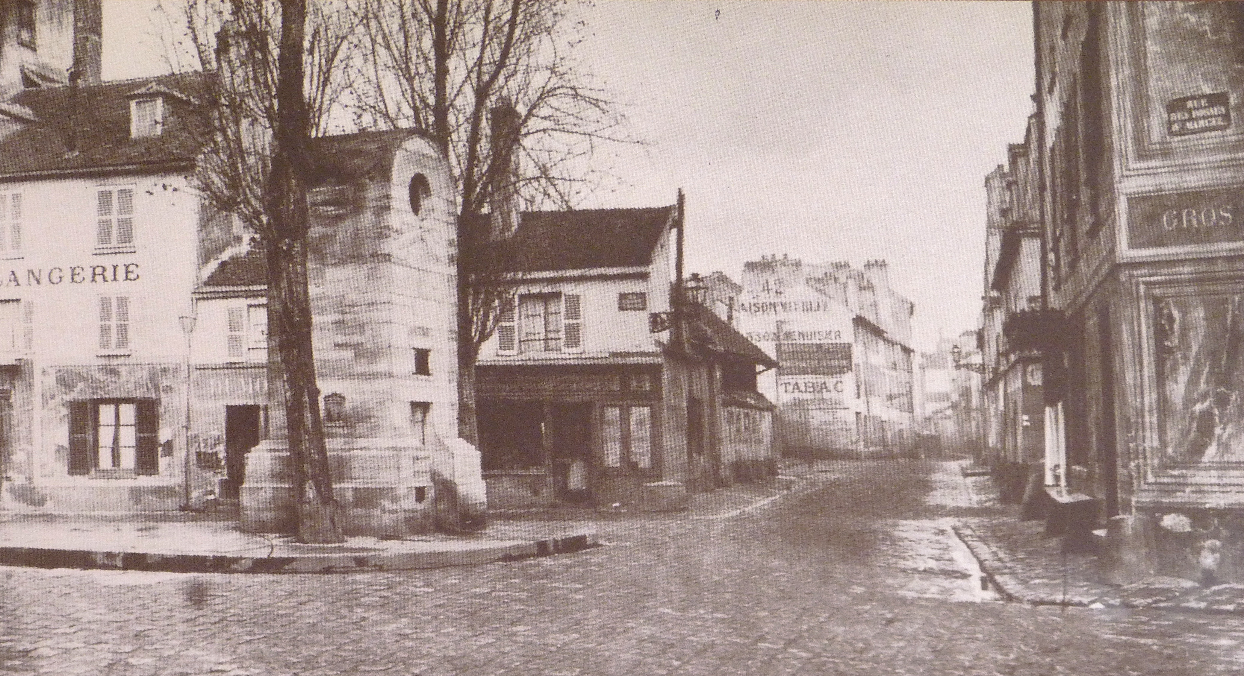 La rue Poliveau vers 1860/1865 (Paris 5e arrond.), photographie de Charles Marville - Au croisement avec la rue Geoffroy Saint Hilaire, la fontaine Poliveau, construite en 1806 et disparue depuis. Sur cet emplacement se trouvait depuis 1546 la Croix-Clamart.